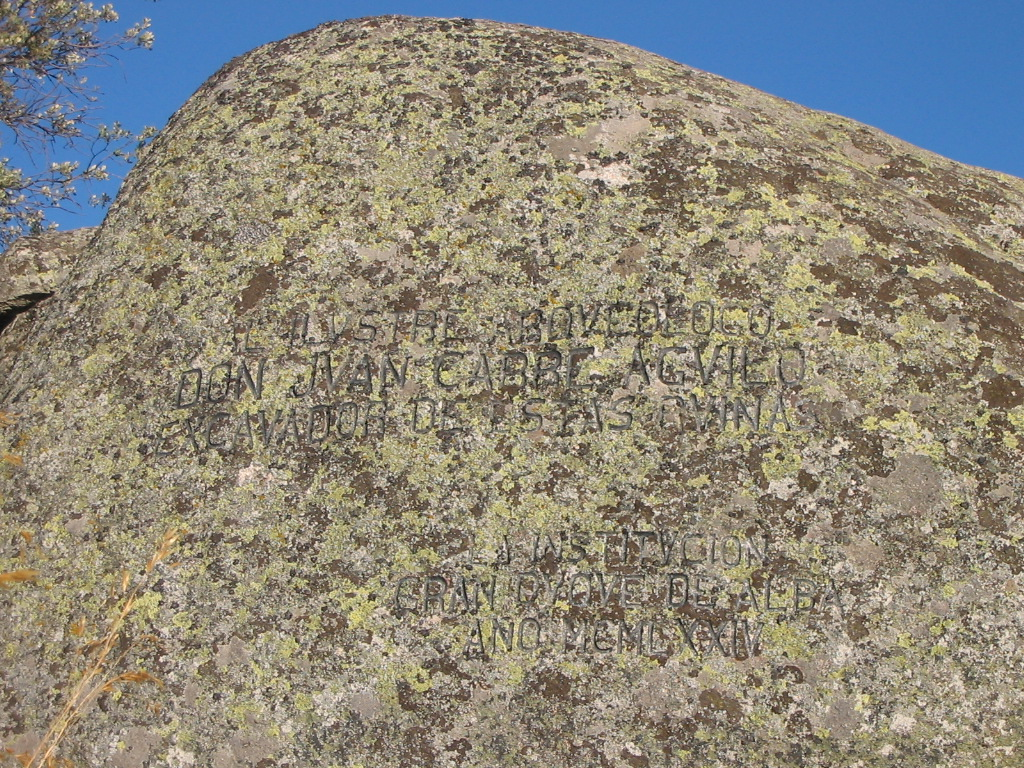 Castro de las Cogotas (Ávila, España). Inscripción: "AL ILUSTRE ARQVEOLOGO DON JVAN CABRE AGVILO EXCAVADOR DE ESTAS RUINAS. LA INSTITVCION GRAN DVQVE DE ALBA. AÑO MCMLXXIV"